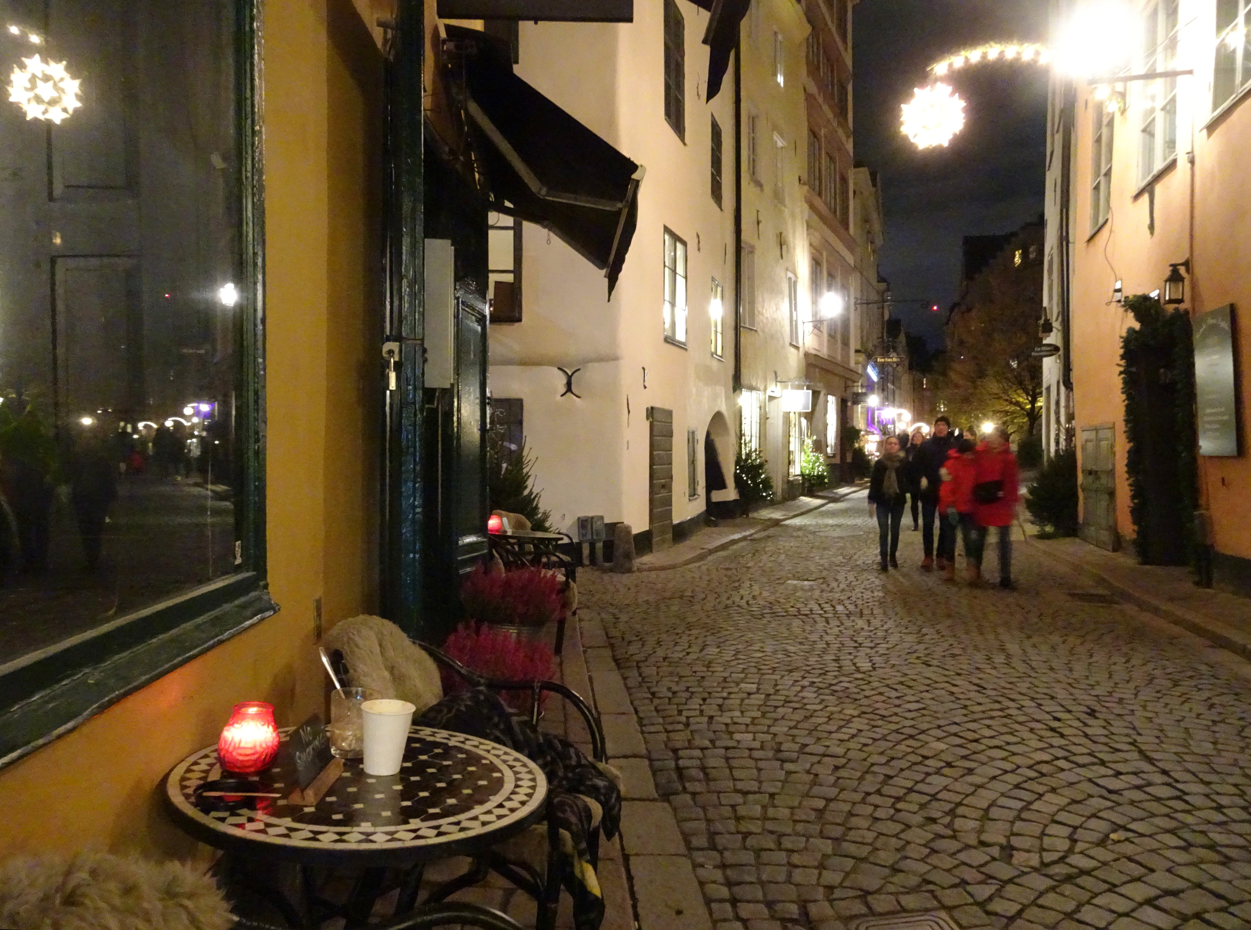 Österlånggatan söderut i höjd med nr 6